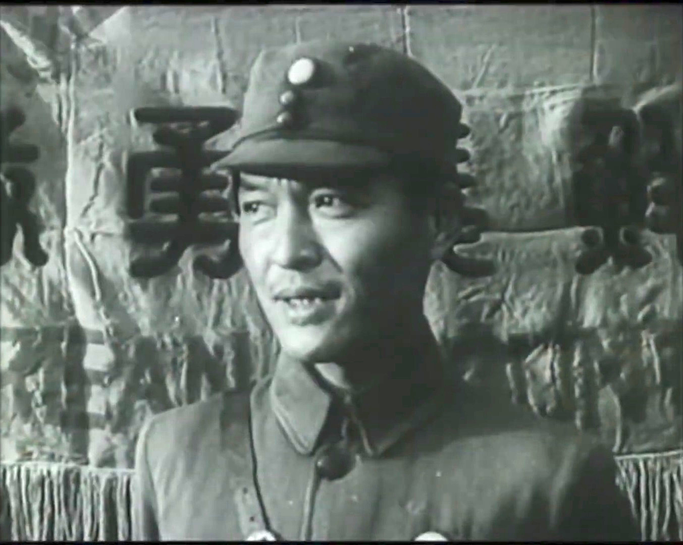 朝鮮義勇隊金元鳳